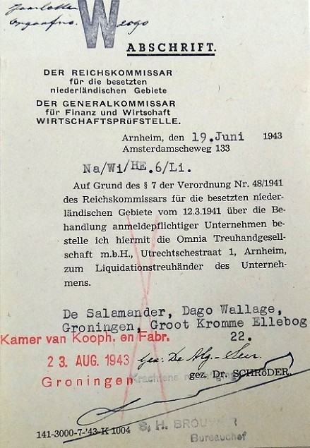 Overname door de Treuhand "OMNIA" van "De Salamander", zaak in hygiënische artikelen en gummiwaren, eigendom van Dago Wallage. Wallage was op het moment van overdracht al vermoord in Auschwitz, evenals zijn gezin